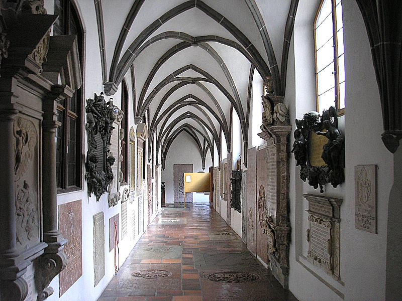 Ehemalige Karmelitenklosterkirche St. Anna (Augsburg, Bayerisch-Schwaben). Der Nordflügel des Kreuzganges. Blick nach Osten. Eigene Aufnahme, März 2007 / Former Carmelite monastery church St. Anna (Augsburg, Bavaria, Germany). The cloister - northern aisle, looking east. Own photo, March 2007